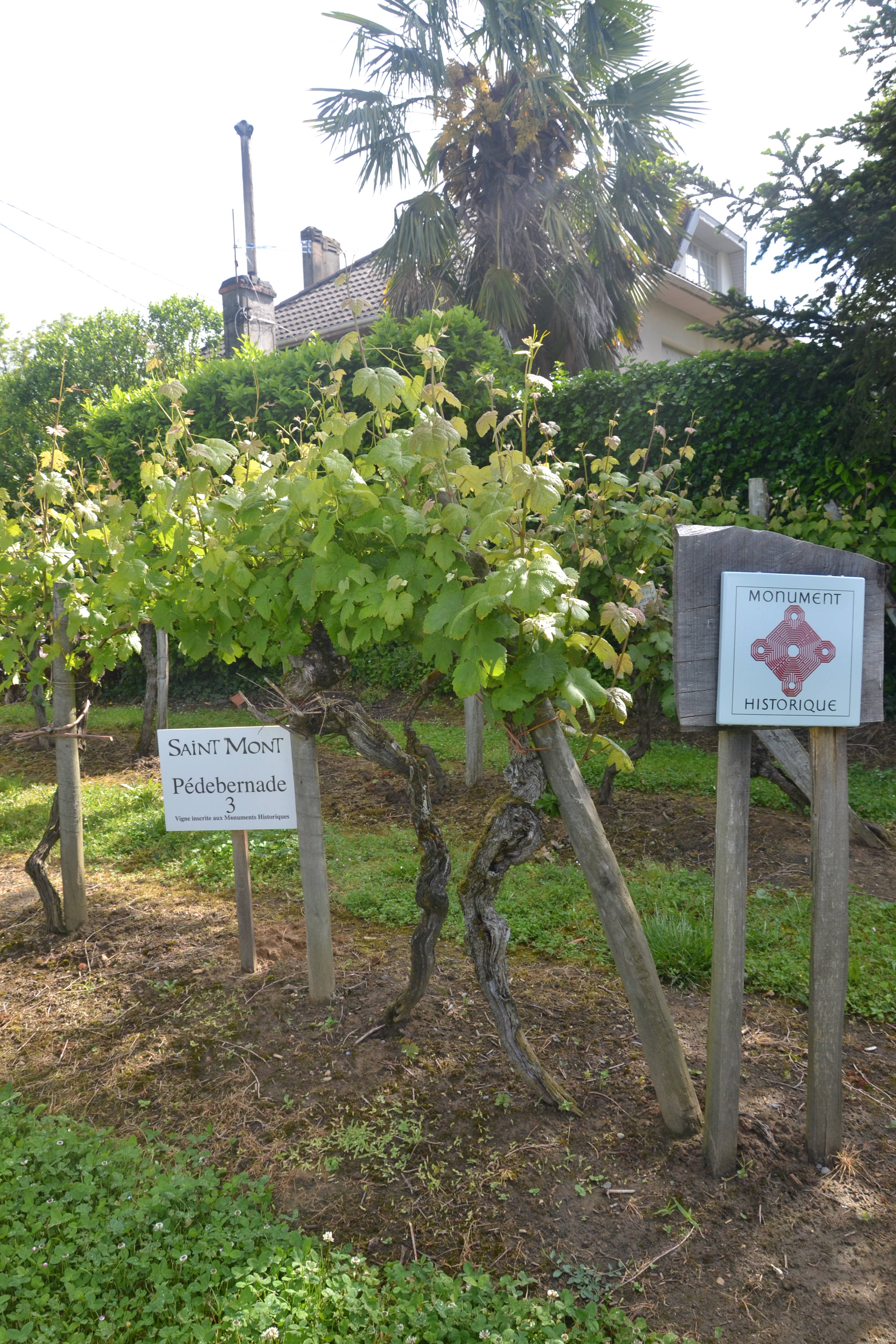 Parcelle de vigne pré-phyloxéra, probablement plantée sous le règne de Napoléon III .